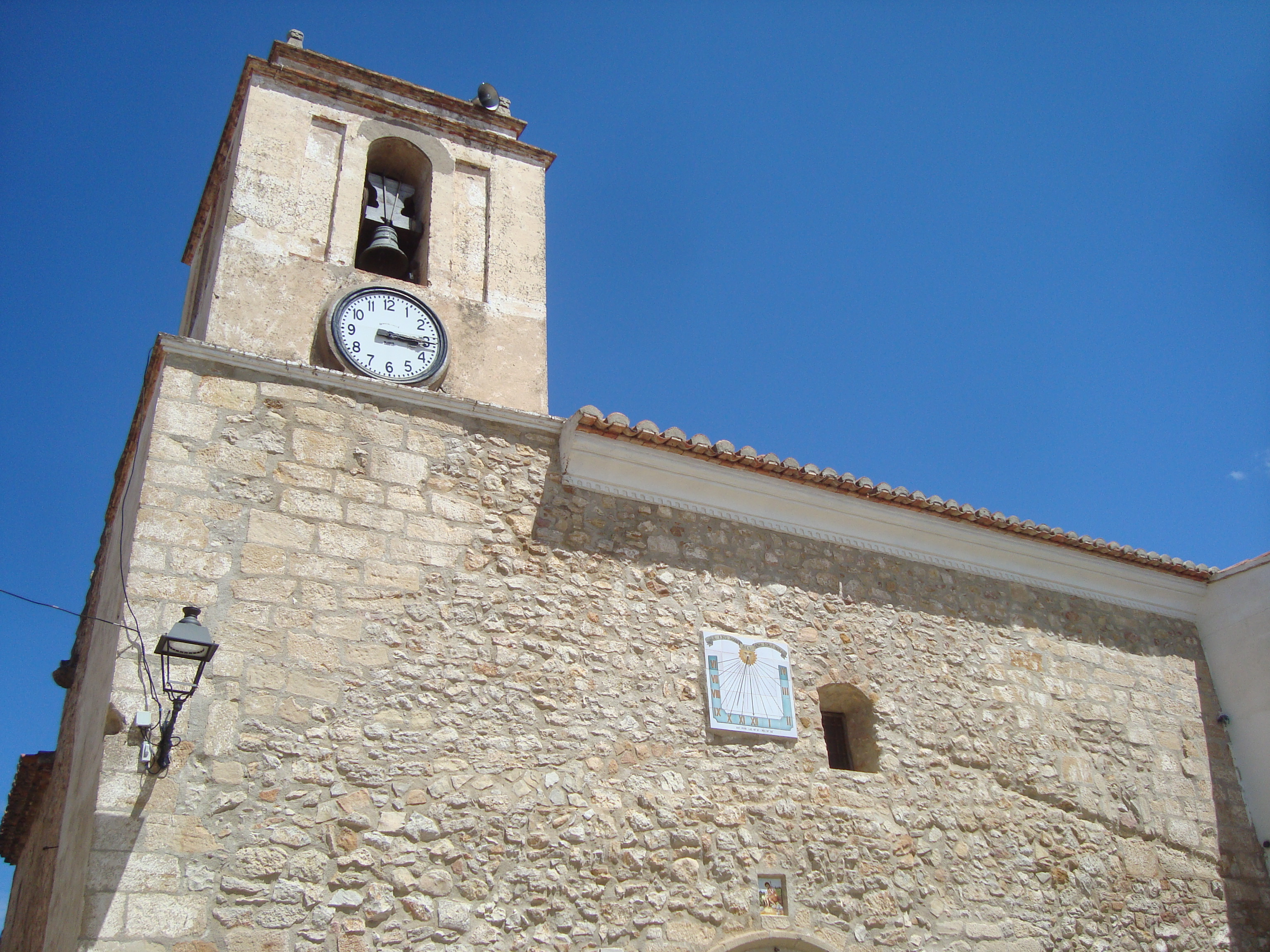 Església parroquial de Sant Joan Baptista (Benafigos) 04.025-004.